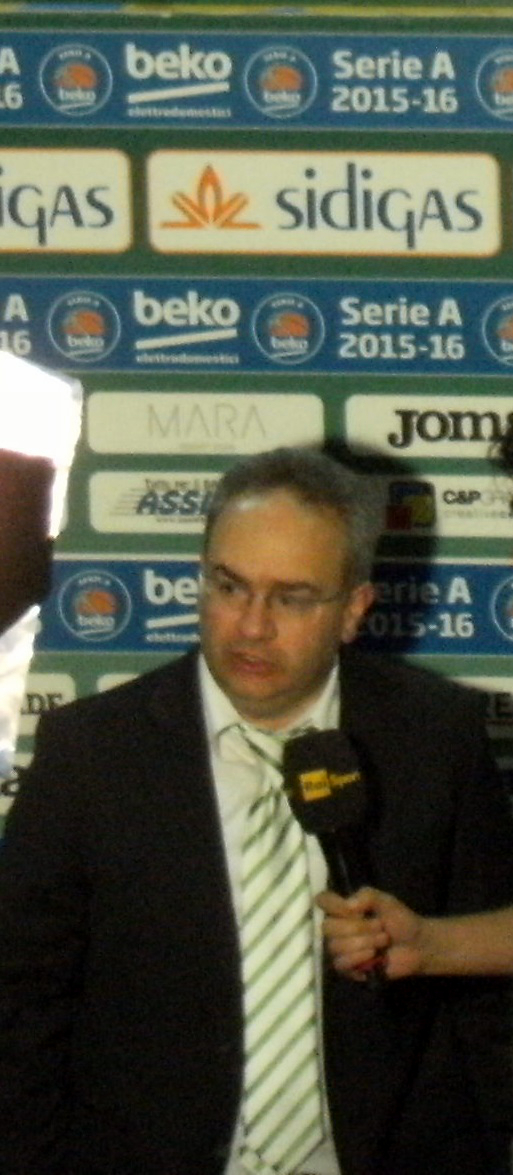 Stefano Sacripanti durante l'intervista post partita. Società Sportiva Felice Scandone - Pallacanestro Reggiana 89-75 Play-off Gara 3 Semifinali Palasport Giacomo Del Mauro di Avellino 22 maggio 2015